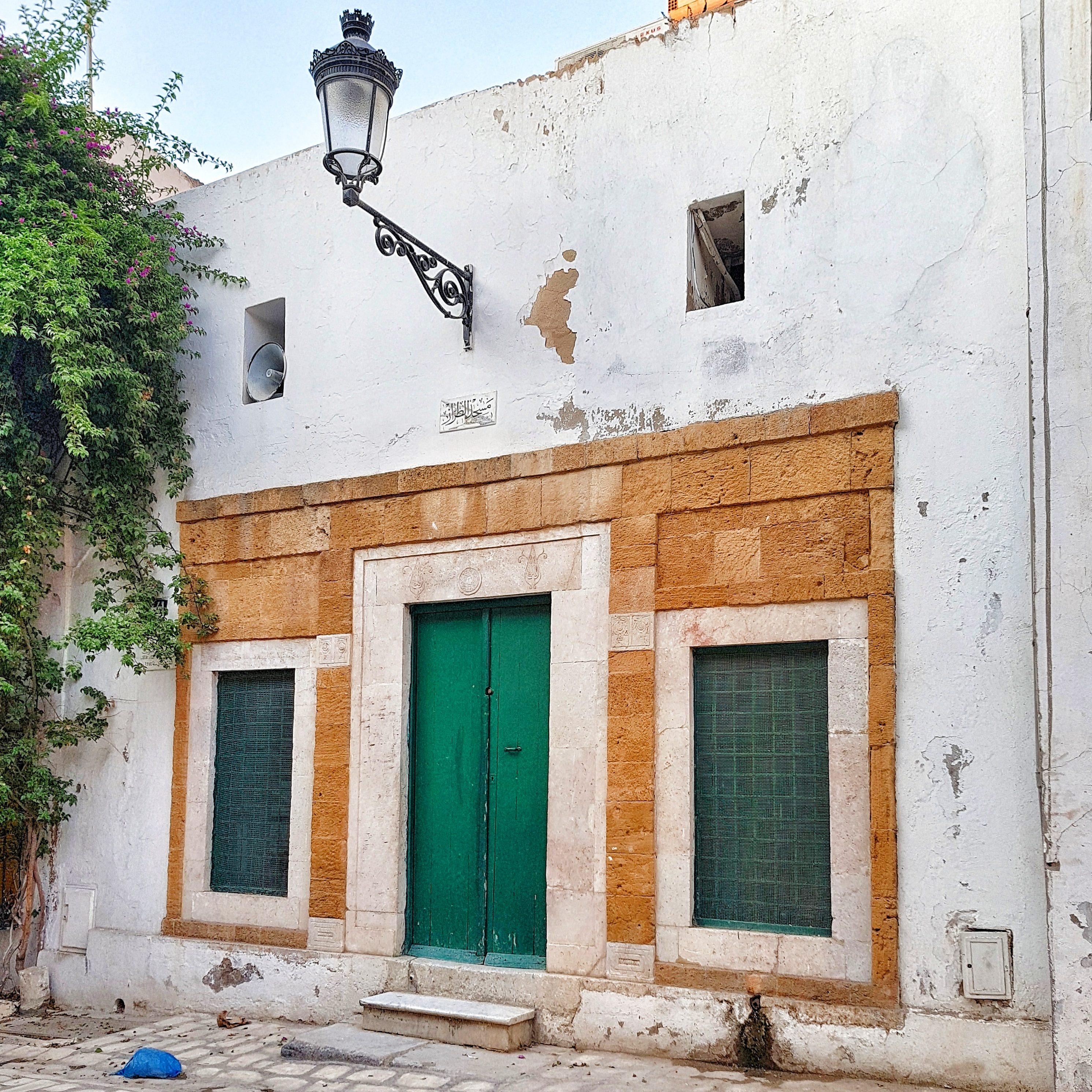 مسجد الطراز : مسجد من العهد الحفصي بنهج سيدي بن عروس في مدينة تونس Mosque Taraz